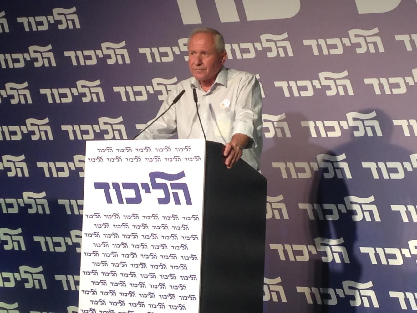 Avi Dichter Likud 2014